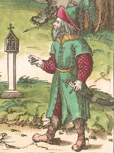 Образ, предположительно, основанный на внешнем виде страдиота.